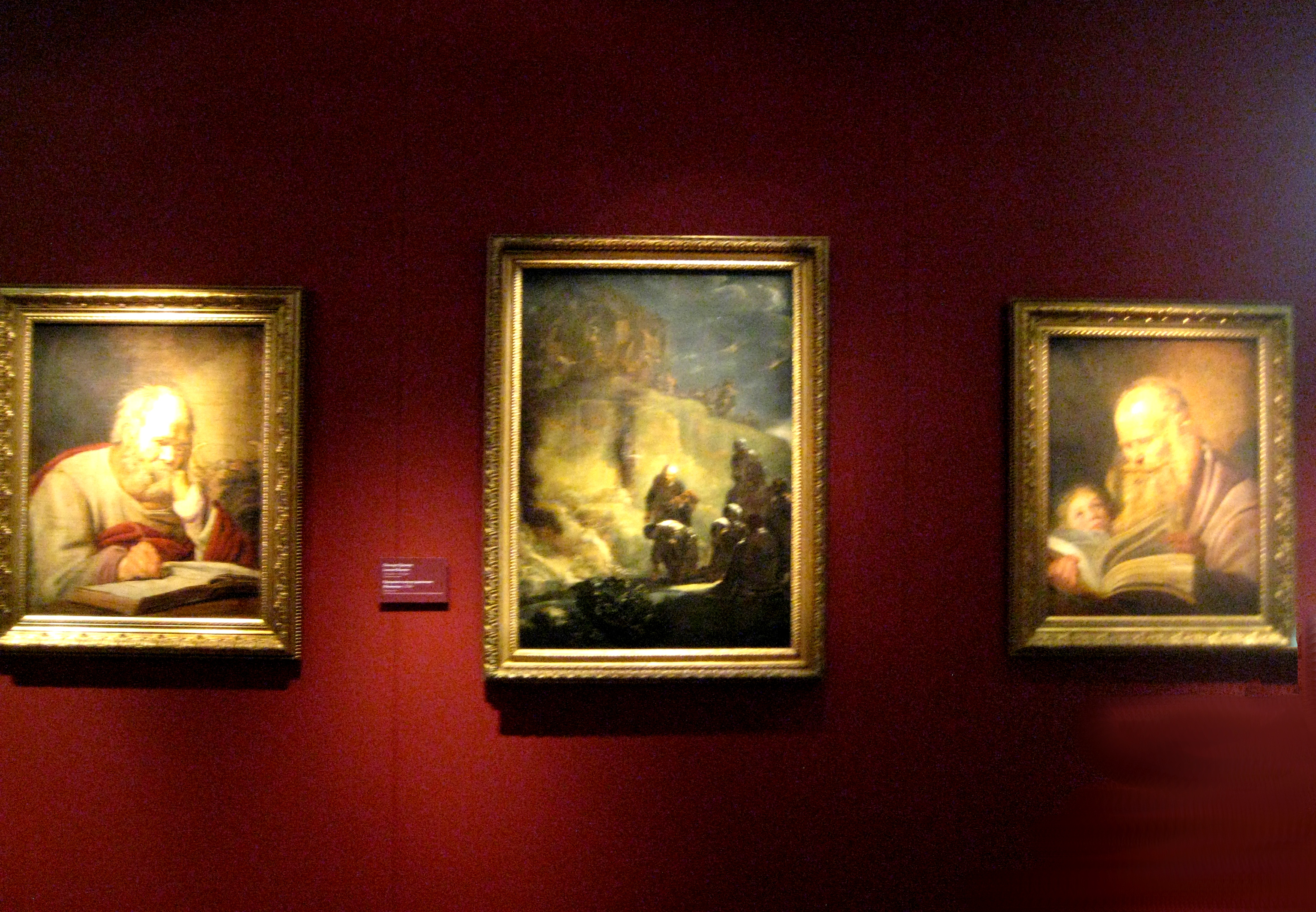 Выставка "Возвращение Святого Луки", Москва, Пушкинский музей 2012